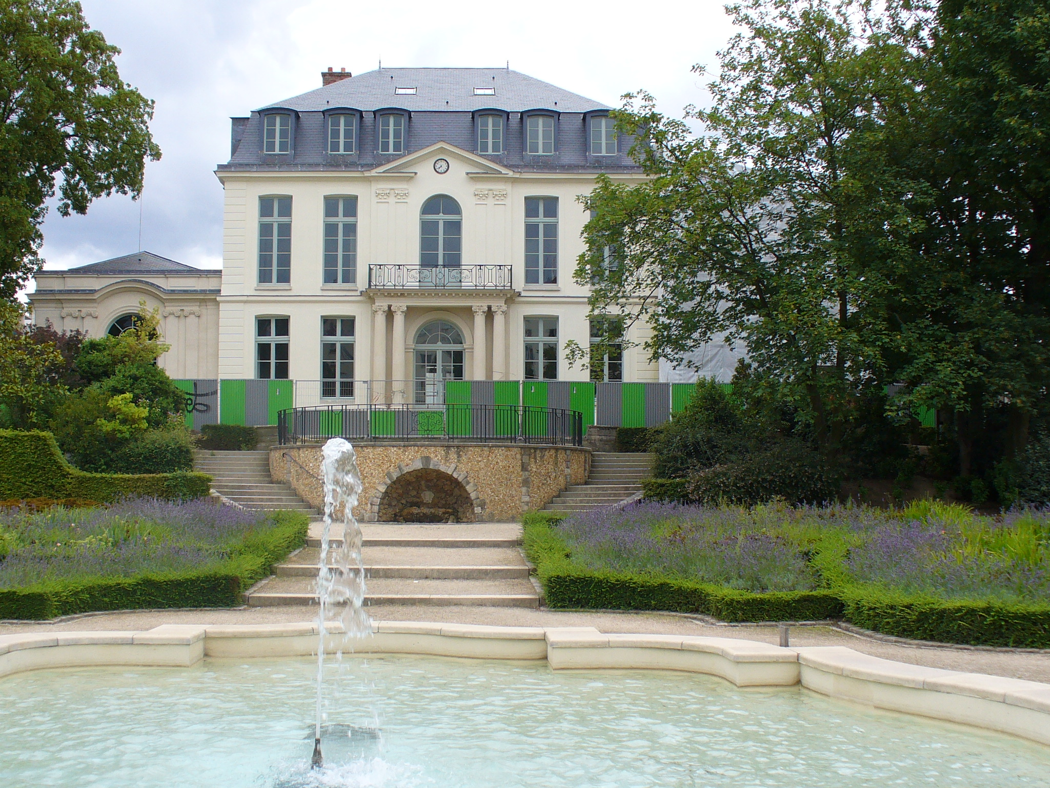 Folie Desmares à Châtillon (92)